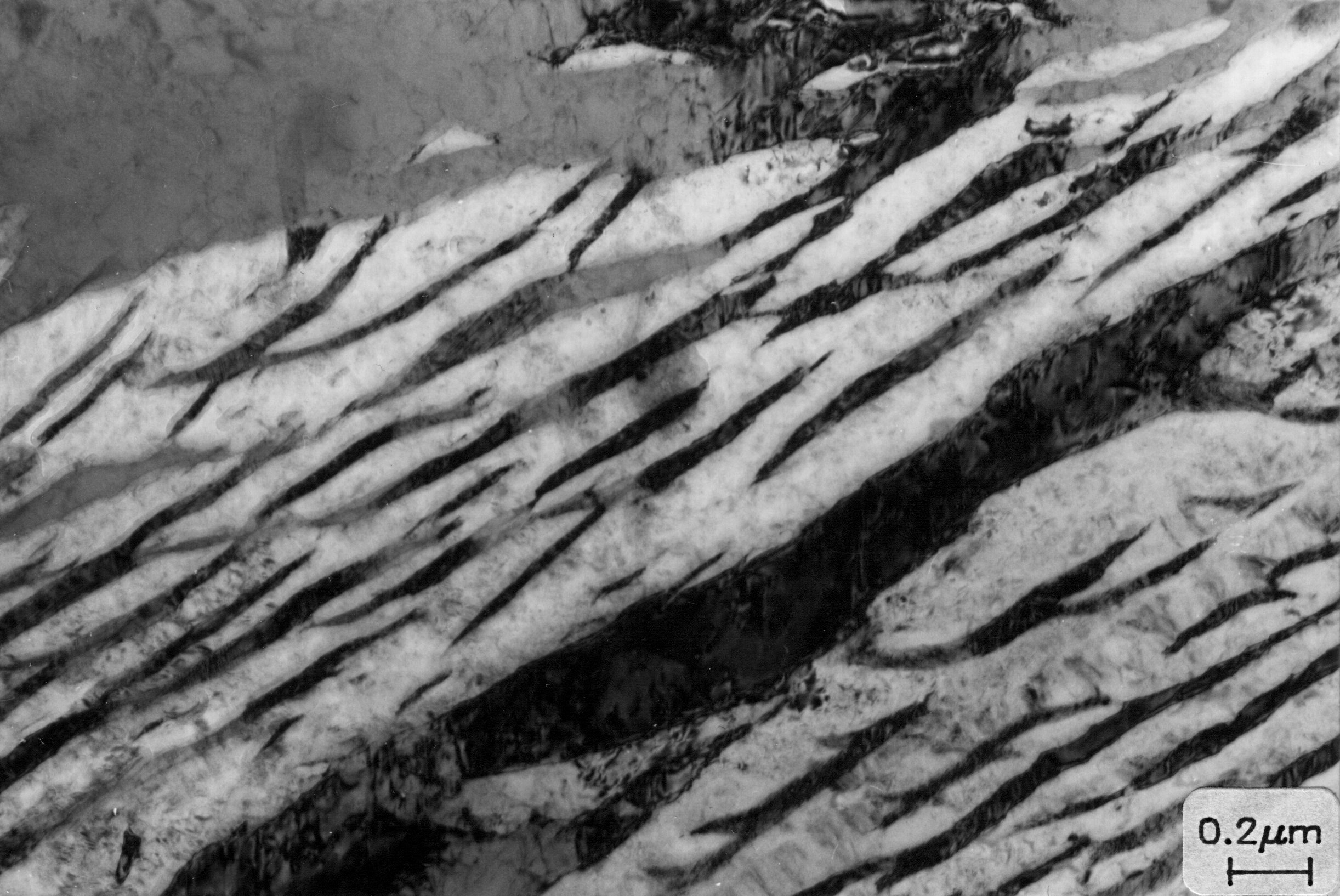 Bild 5.25 Gefüge von 80 Si 13 nach 2h Umwandlung bei Tu=350°C (21000x)